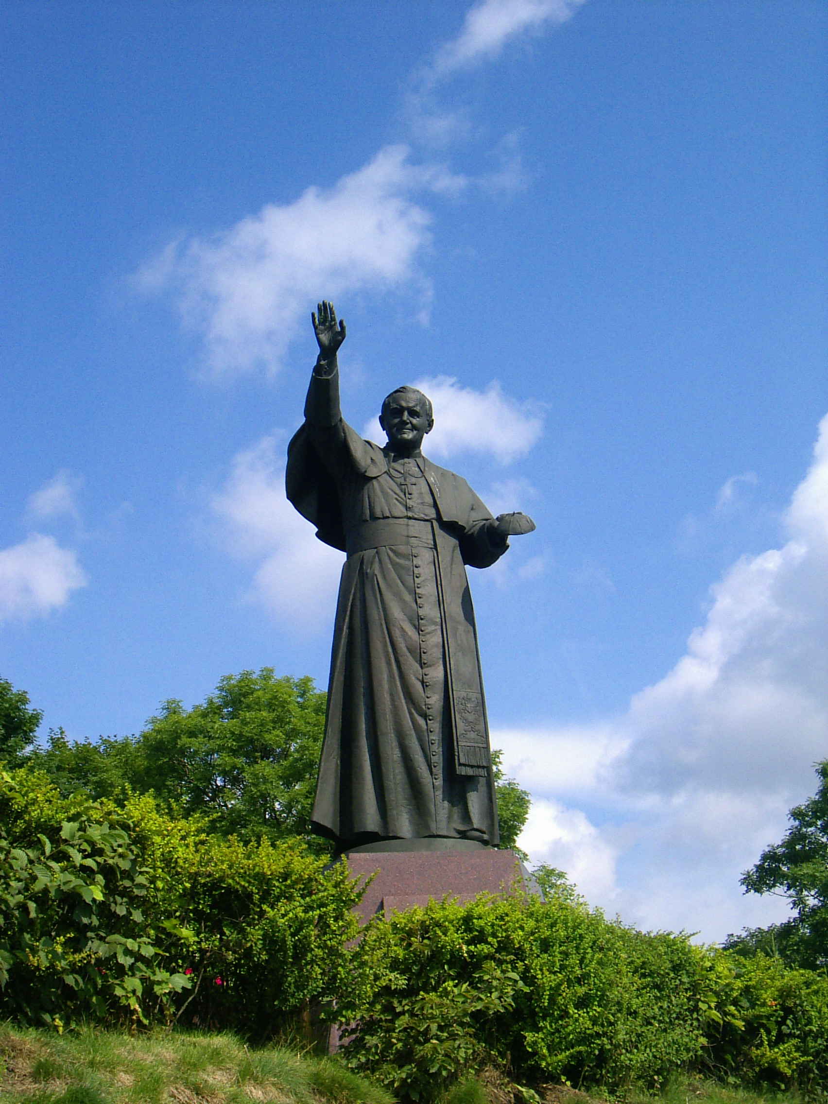 Pomnik Jana Pawła II na Jasnej Górze.